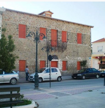 Το κτίριο Σισίνη στη Γαστούνη